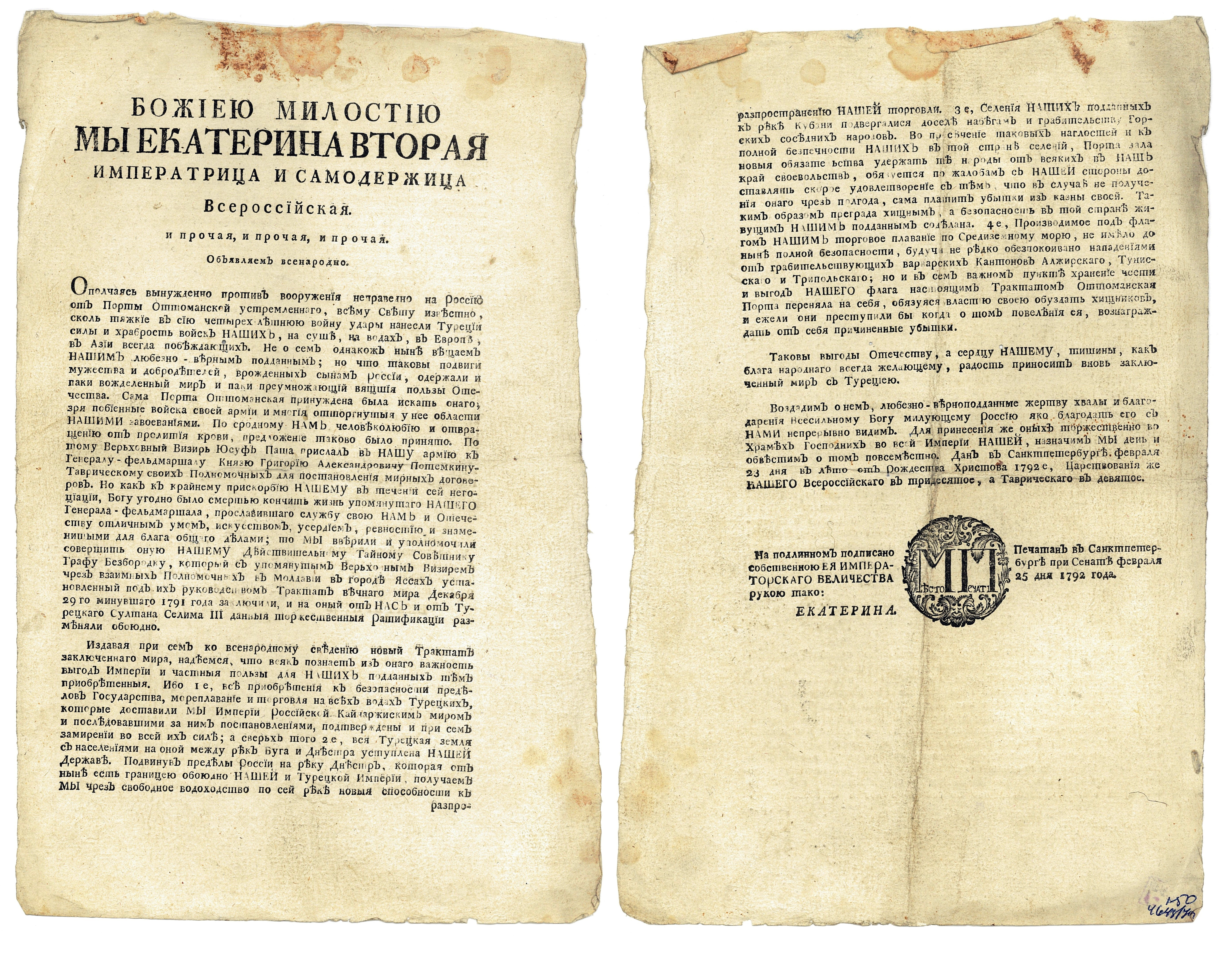 Договор закрепил за Россией всё Северное Причерноморье, включая Крым, усилил её политические позиции на Кавказе и Балканах. К России отошли земли между Южным Бугом и Днестром, по которому была установлена новая граница. На Кавказе восстанавливалась граница по реке Кубань. Турция отказывалась от претензий на Грузию и обязалась не предпринимать каких-либо враждебных действий против грузинских земель. Статья 3-я договора определяла, что «между Империeю Всероссийскою и Портою Оттоманскою пребудет границею река Днестр, так, что все земли, на левом берегу помянутой реки лежащия, имеют остаться вечно в совершенном и безпрепятственном владении Всероссийской Империи, а на правом берегу помянутой реки и лежащия все земли, по возвращении их со стороны Всероссийской Империи, имеют остаться вечно в совершенном и безпрепятственном владении Порты Оттоманской». Опасаясь преследований со стороны властей Османской империи, Молдавское княжество покинуло значительное число жителей, большинство из которых переселилось за Днестр. Там сторонники России из числа молдавского боярства получили большие земельные владения. В Приднестровье были основаны города Григориополь (1792 год) и Тирасполь (1795 год). После заключения Ясского мирного договора Молдавское княжество стало ареной борьбы между Россией, Францией и Австрией, пытавшимися установить там своё влияние. Екатерина II, не удовлетворившись достигнутым, планировала дальнейшие события. Присоединение к России после Ясского мирного договора территорий между Южным Бугом и Днестром многократно ускорило заселение и хозяйственное освоение этого региона. В 1794 году на землях, полученных в результате Ясского мира, был основан город Одесса.